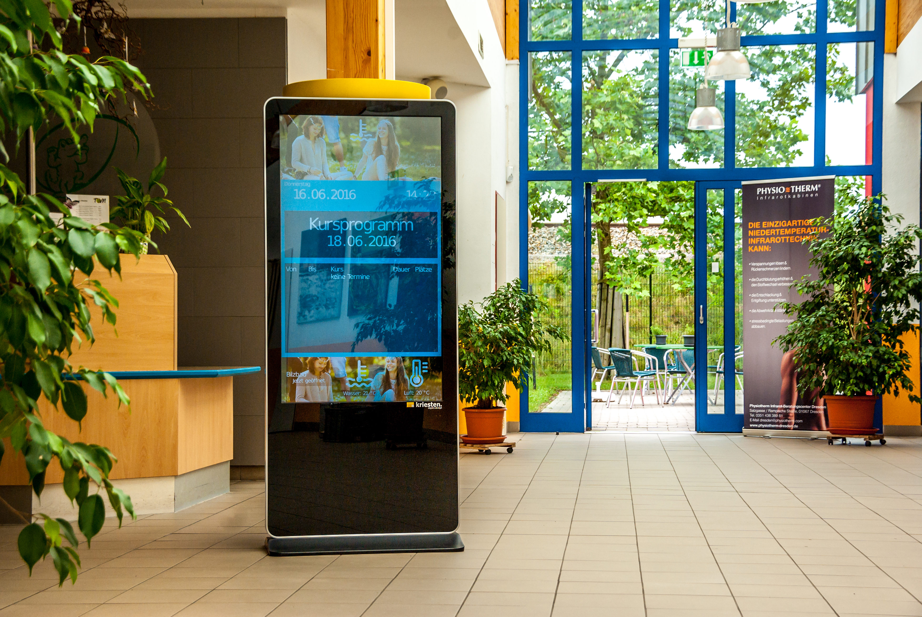 Digital Signage - Infoterminal im Tourismusgewerbe zur Wiedergabe von (Gäste- bzw. Besucher-) Informationen der jeweiligen Einrichtung (u.a. Programm, Höhepunke, Wetter oder Infos zum ÖPNV)..